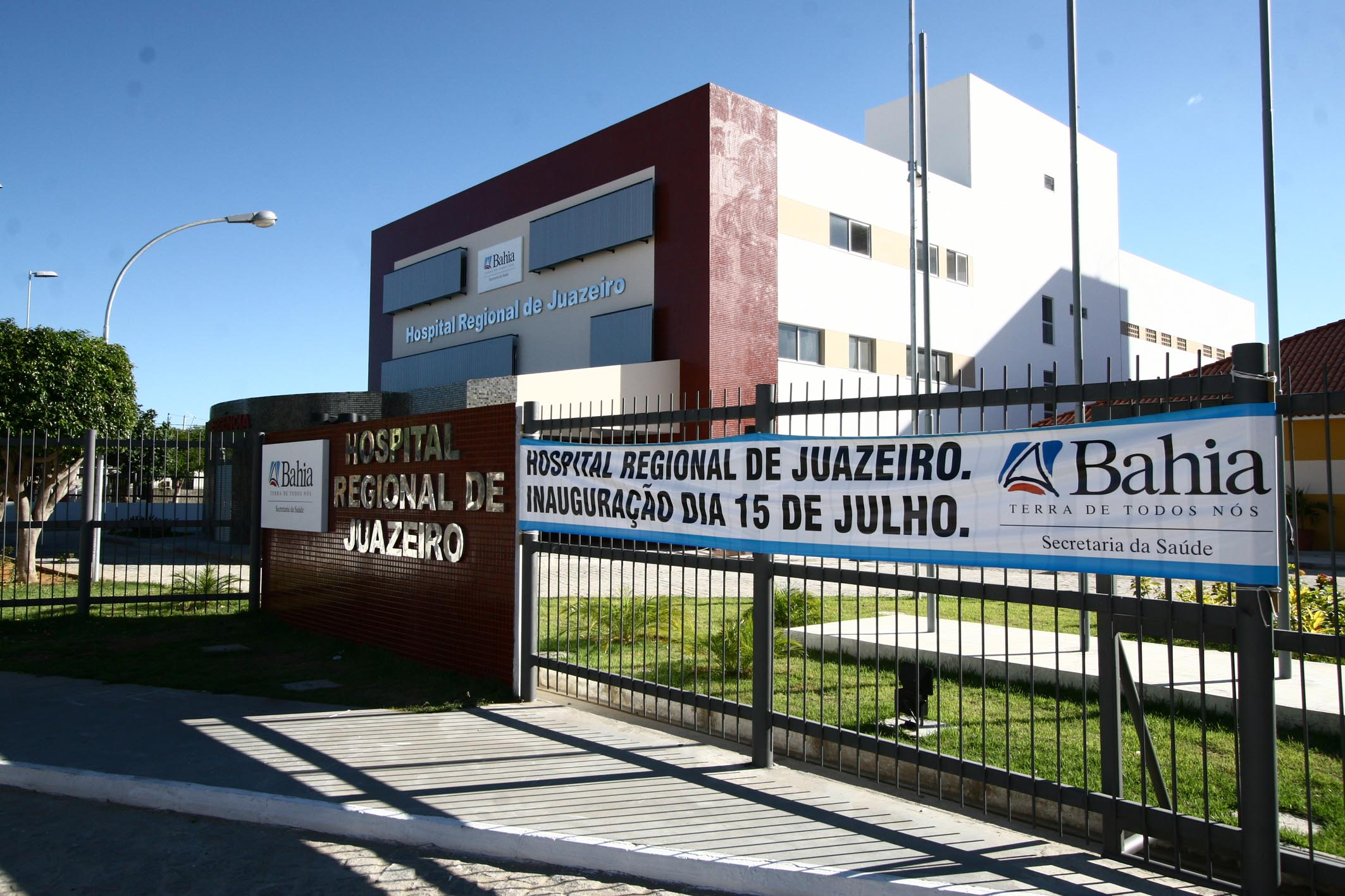 O Hospital Regional de Juazeiro tem mais de sete mil metros quadrados. Foto: Arisson Marinho / AGECOM